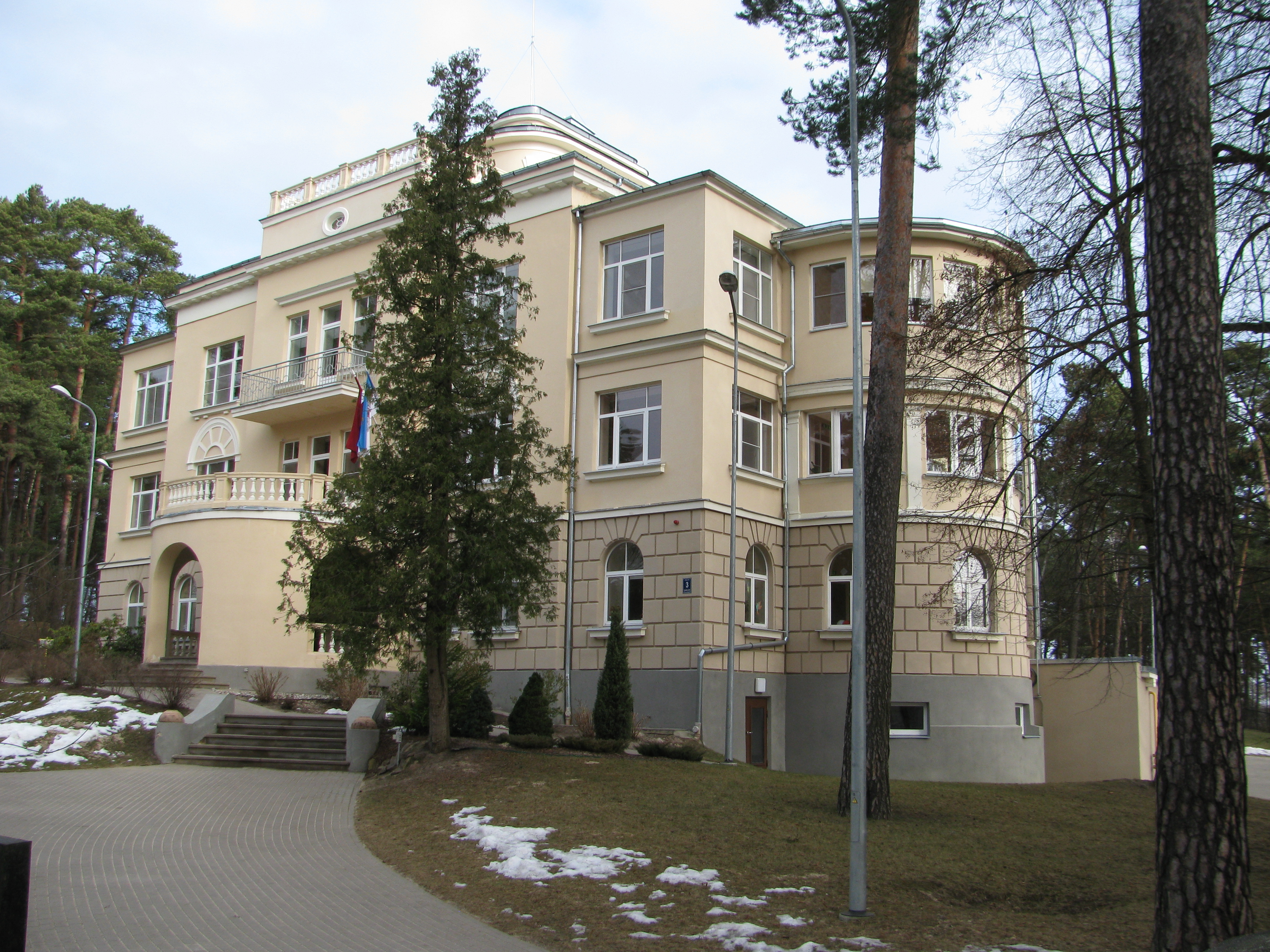 Savrupmāja, Ziemeļu rajons, Cimzes iela 3